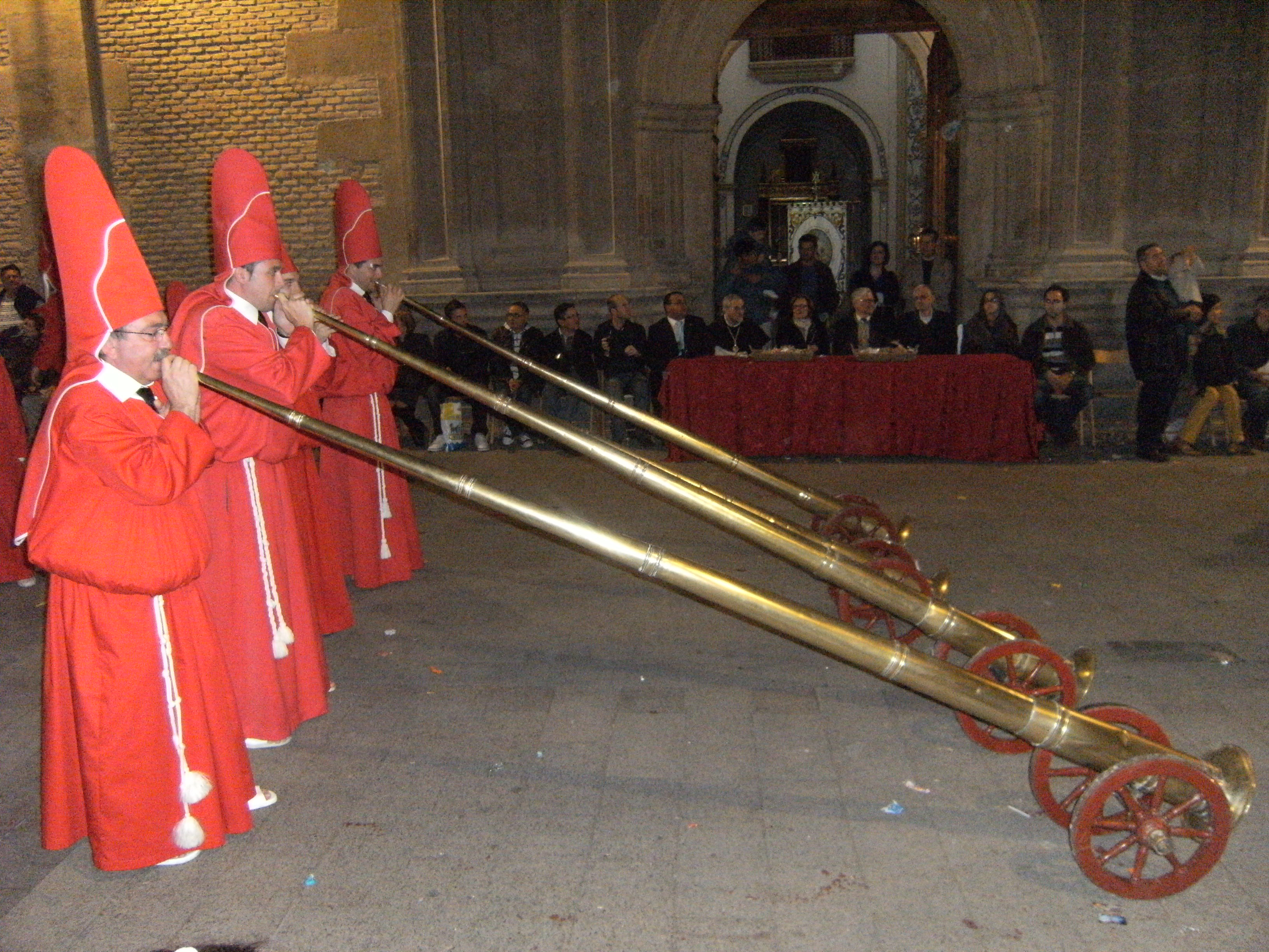 Imágen de nazarenos de la Cofradía de los Coloraos (Murcia, España), tocando los carros-bocina típicos del toque de Burla, original del siglo XVII.